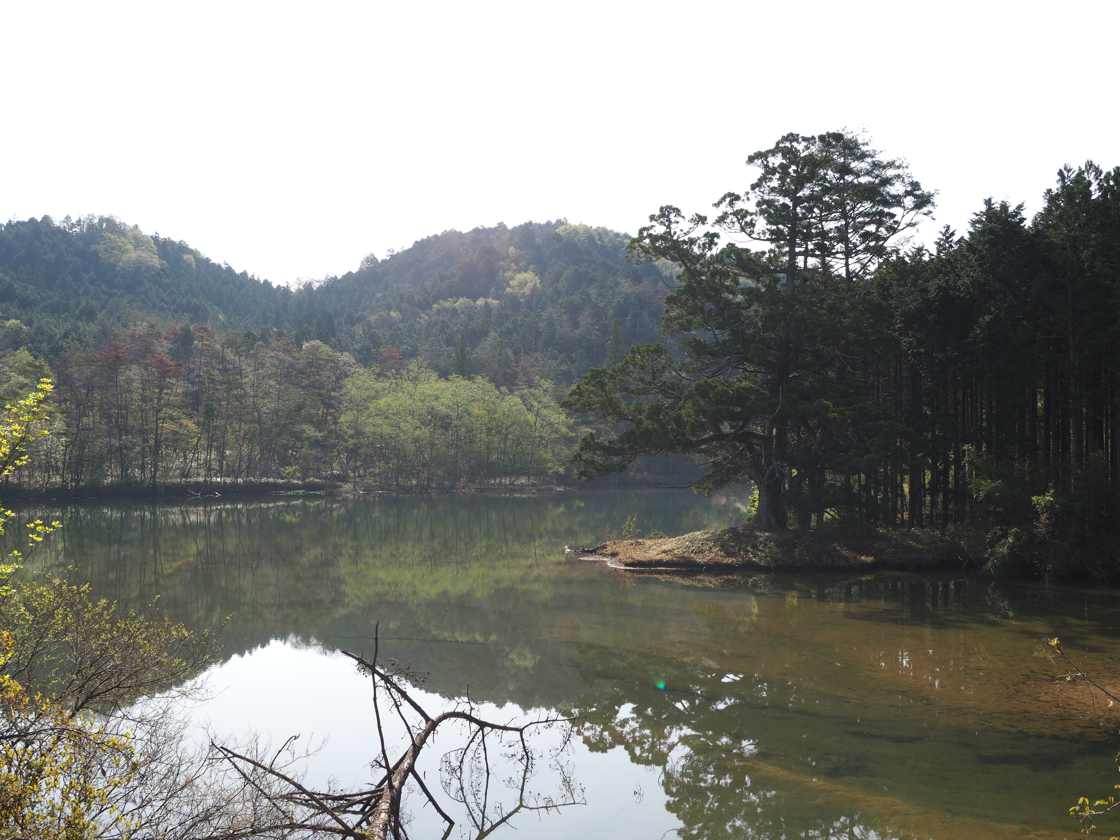 滋賀県甲賀市甲南町にある岩尾池の一本杉。滋賀県自然記念物。 幹回り4.7m、高さ15m、樹齢1,000年以上（伝承） 伝教大師・最澄が食事の後の箸を刺すとたちまち芽吹いてこの大杉になったと伝わる。